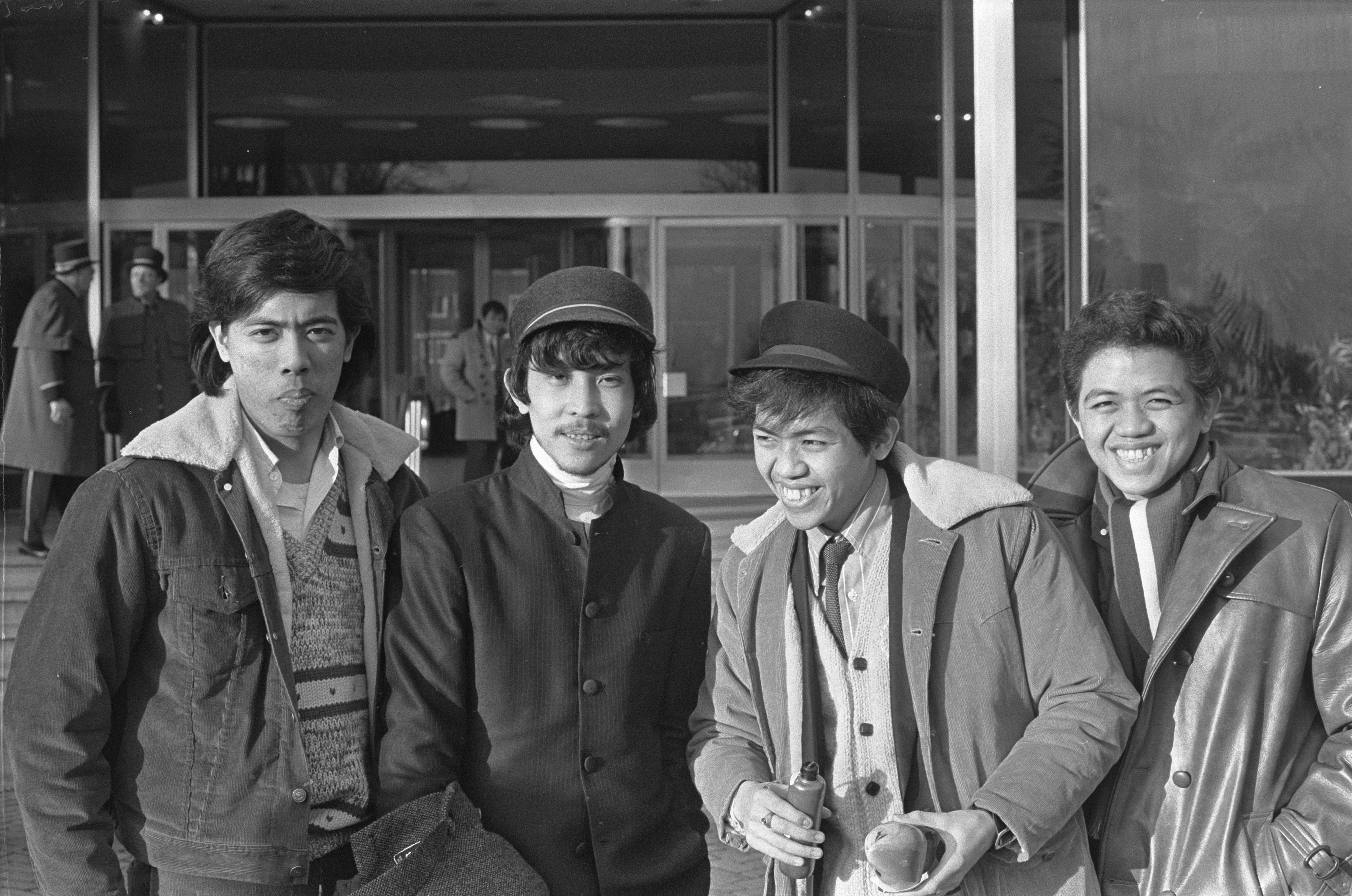 Collectie / Archief : Fotocollectie Anefo Reportage / Serie : [ onbekend ] Beschrijving : Pop-groep uit Hongkong "Danny en the Checkmates" in Amsterdam Datum : 3 februari 1969 Locatie : Amsterdam, Hongkong Trefwoorden : Popgroepen Fotograaf : Verhoeff, Bert / Anefo Auteursrechthebbende : Nationaal Archief Materiaalsoort : Negatief (zwart/wit) Nummer archiefinventaris : bekijk toegang 2.24.01.05 Bestanddeelnummer : 922-0707 Reacties Geplaatst door Muziekliefhebber op 02 januari 2018 - 15:06. Leden: Danny Diaz, Romeo Diaz, Rudy Diaz en Tatengco NB. Zij waren winnaars van een in het Verre Oosten gehouden talentenjacht 'Levi's battle of the sounds '69'. Zij gaven een éénmalig live-optreden in de 'Fietsotheque' van het Hilton Hotel te Amsterdam.